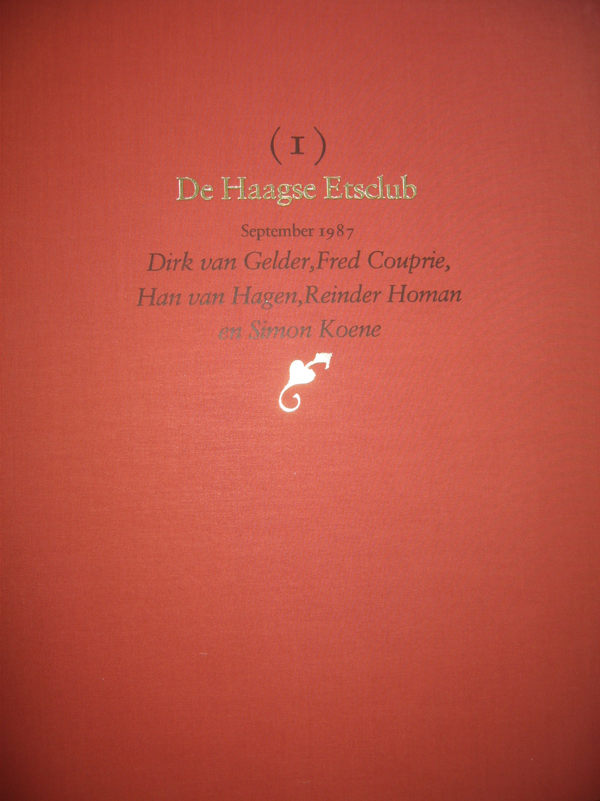 Haagse Etching Club cover of the edition landscapes